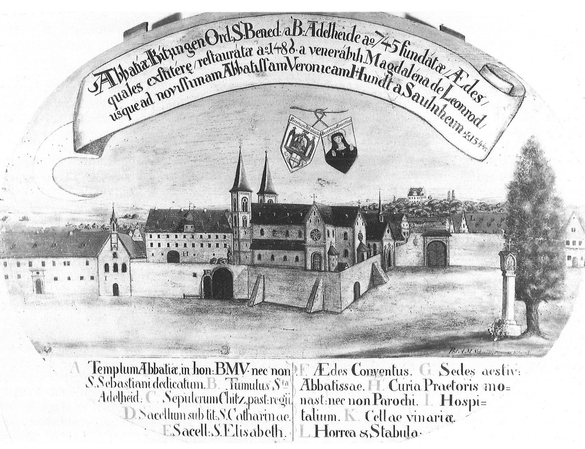 Holztafelbild des 16. Jahrhunderts, Benediktinerinnenkloster Kitzingen, Wappen Konvent, Äbtissin Veronika Hundt von Saulheim